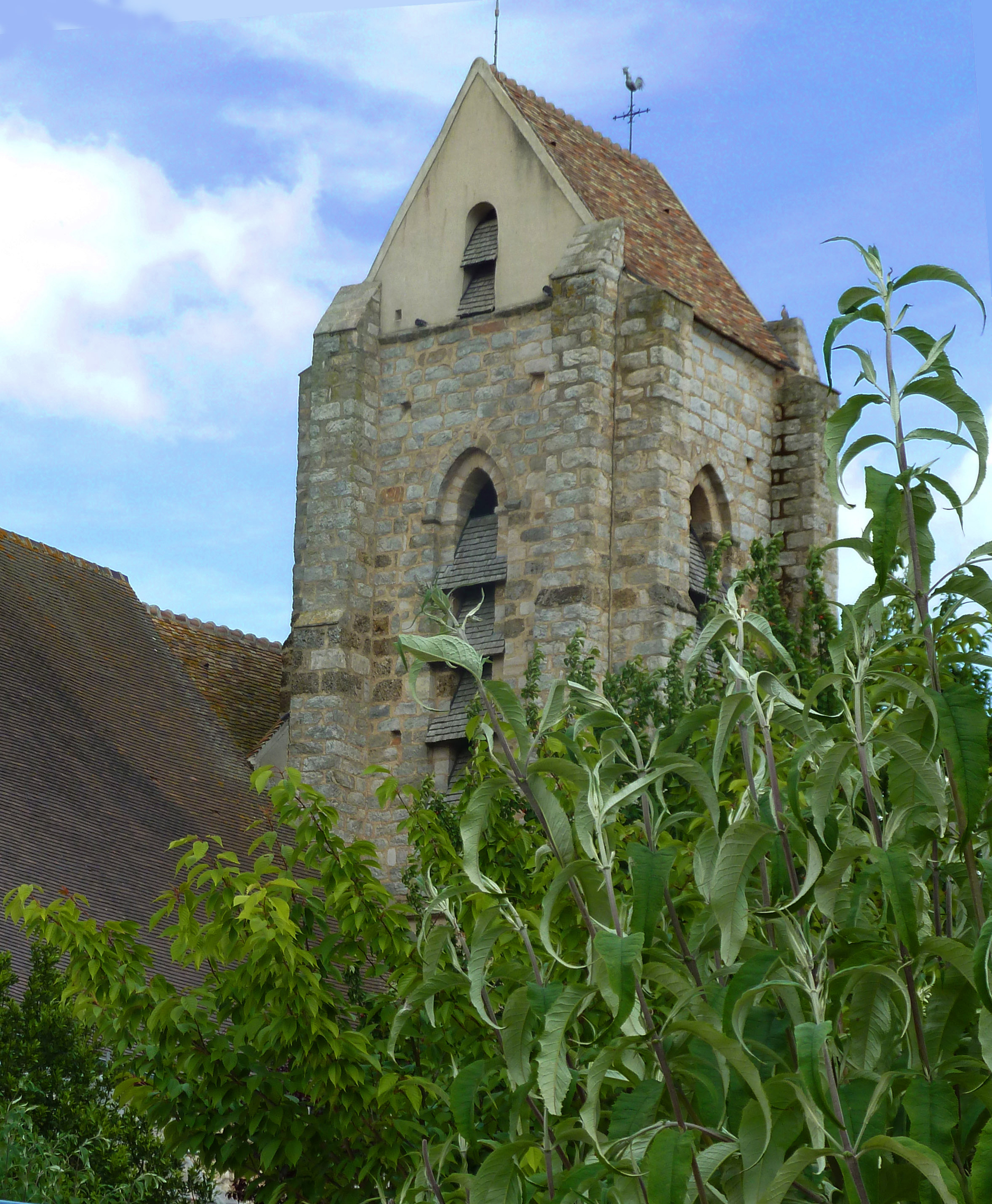 11è au 18è siècle .